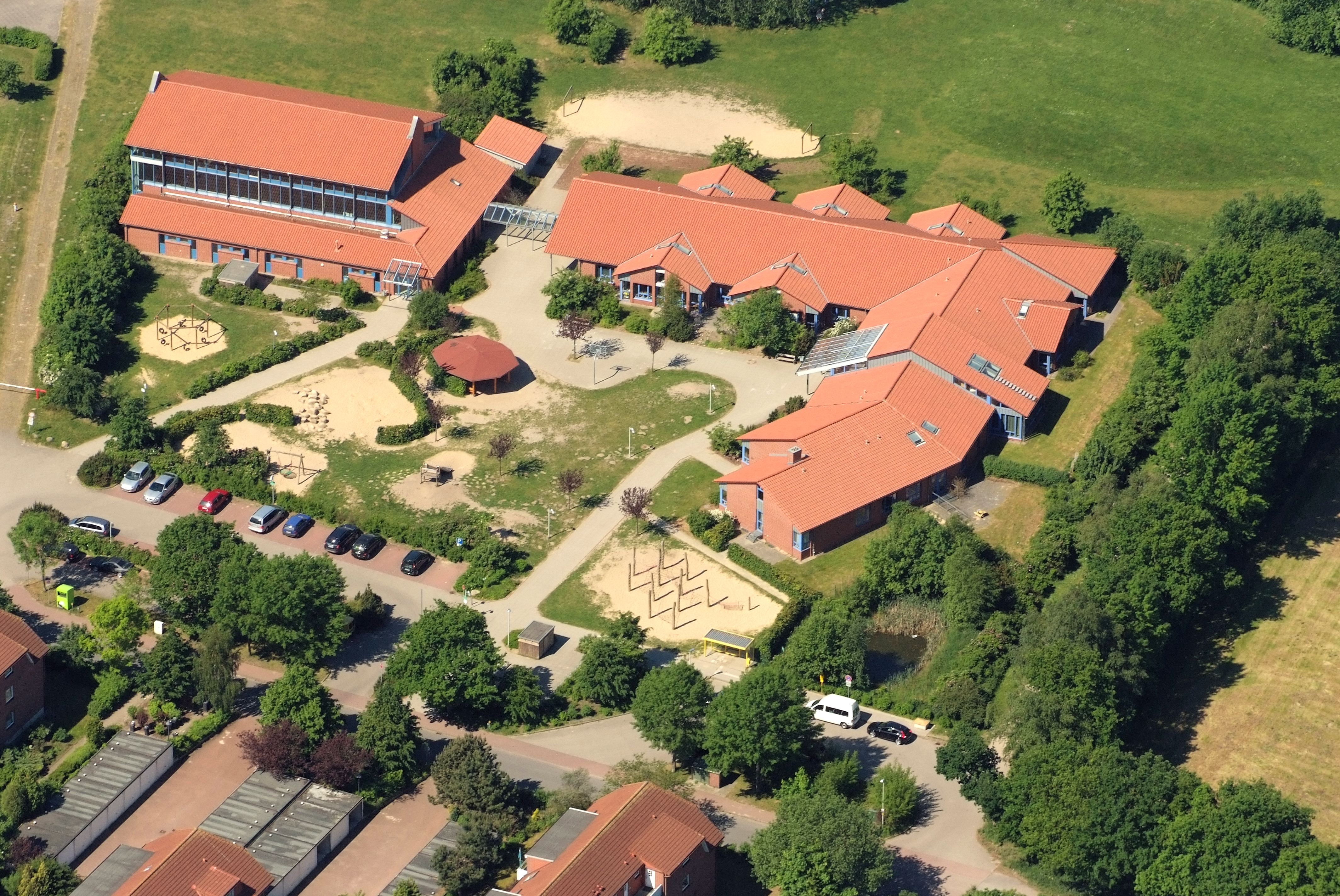 Grundschule Langen (bei Bremerhaven), Fotoflug vom Flugplatz Nordholz-Spieka über Cuxhaven und Wilhelmshaven